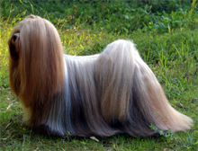 ラサ・アプソ